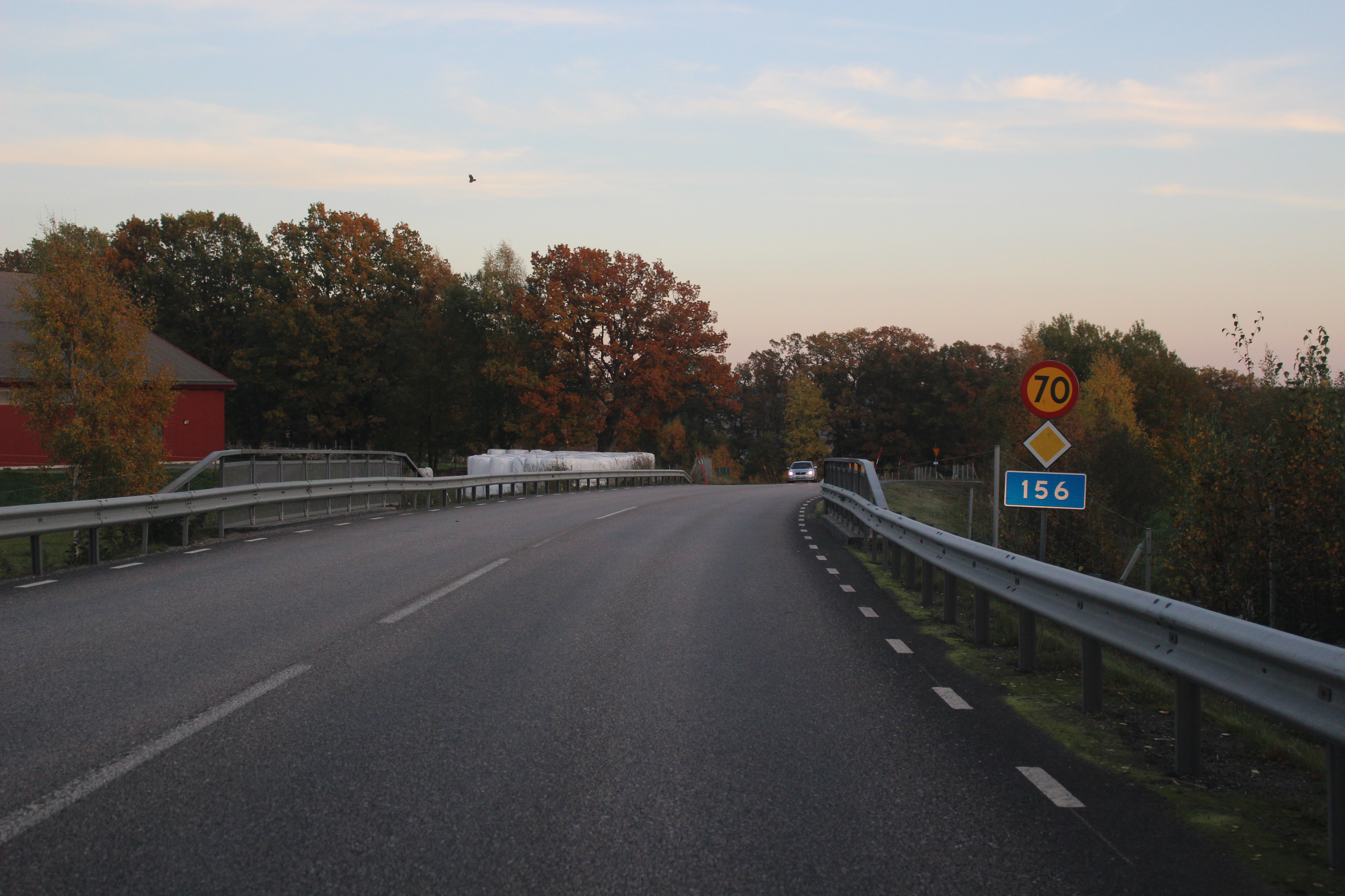 Skenevägen mot öster, tre kilometer öster om Skene.